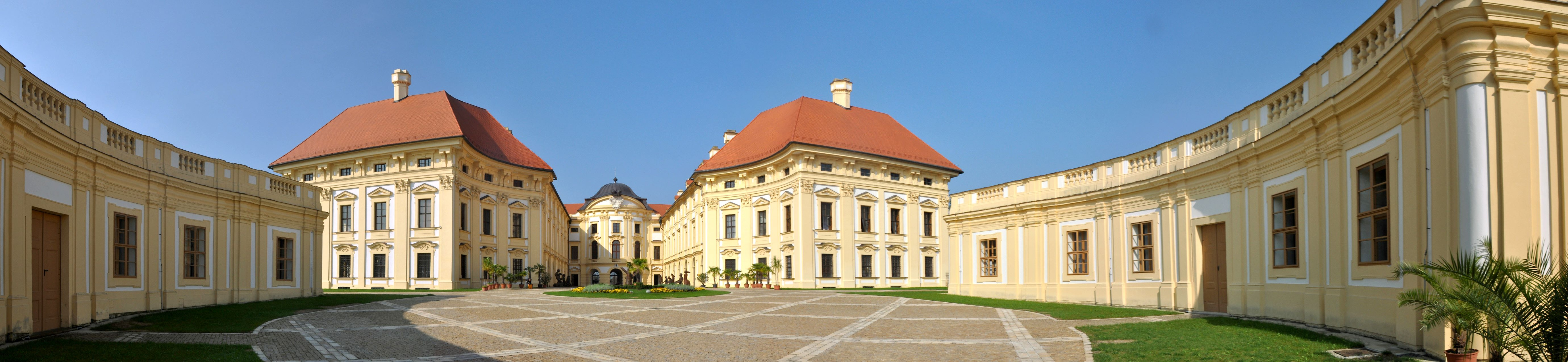 Schloss Slavkov u Brna (Austerlitz)